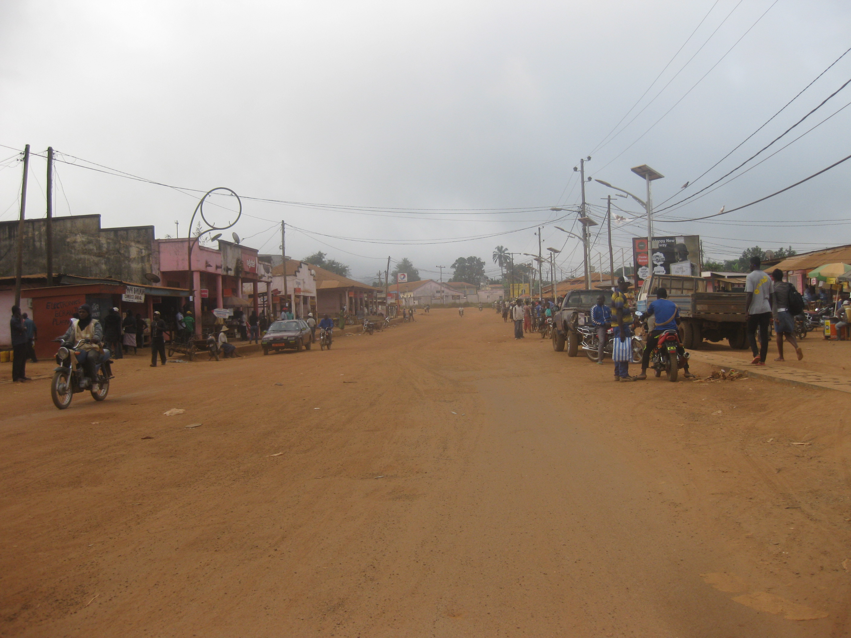 Rue principale du centre ville de Nanga-Eboko.